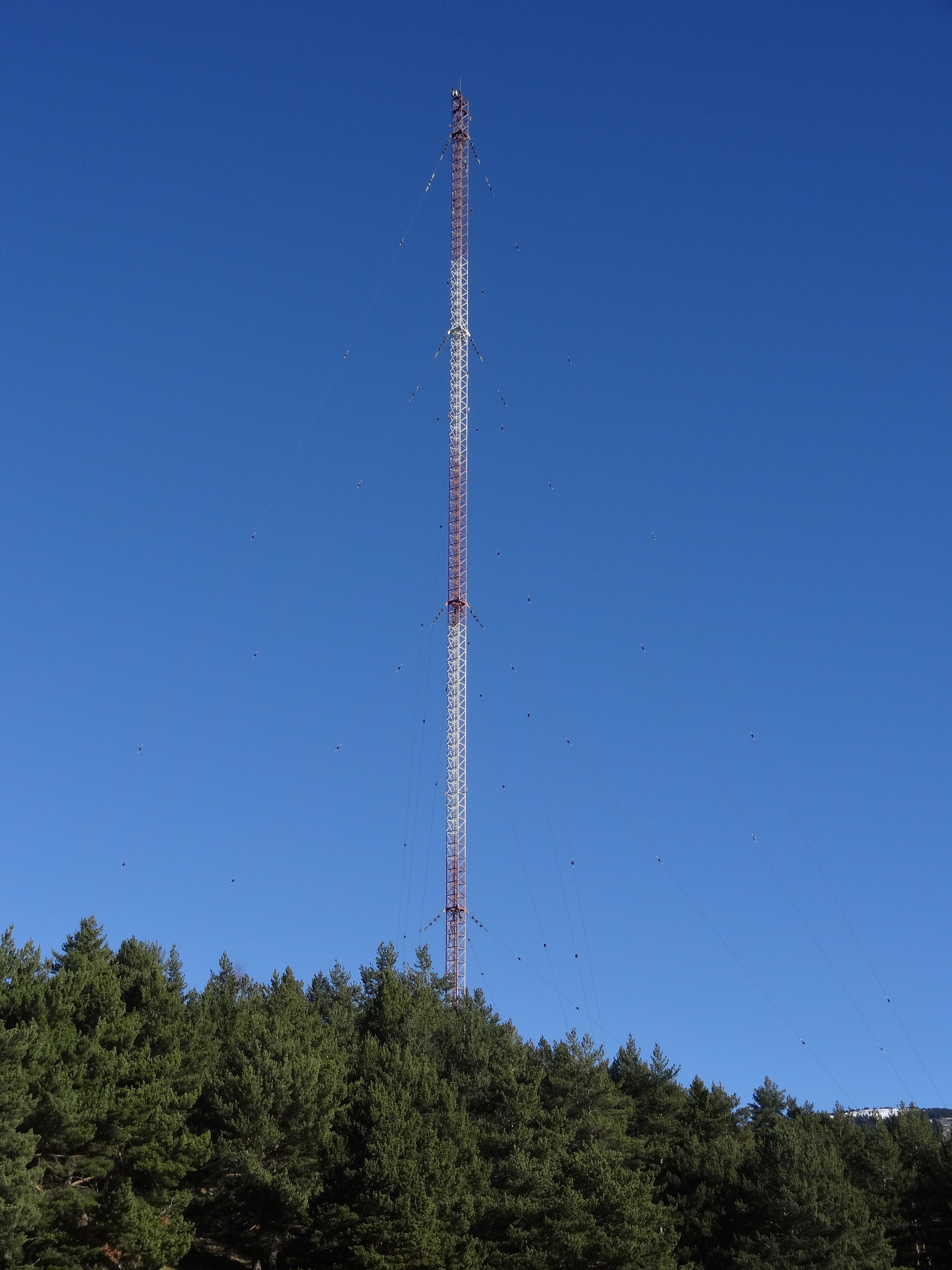 Antenne de radiodiffusion à côté du Lac d'Engolasters